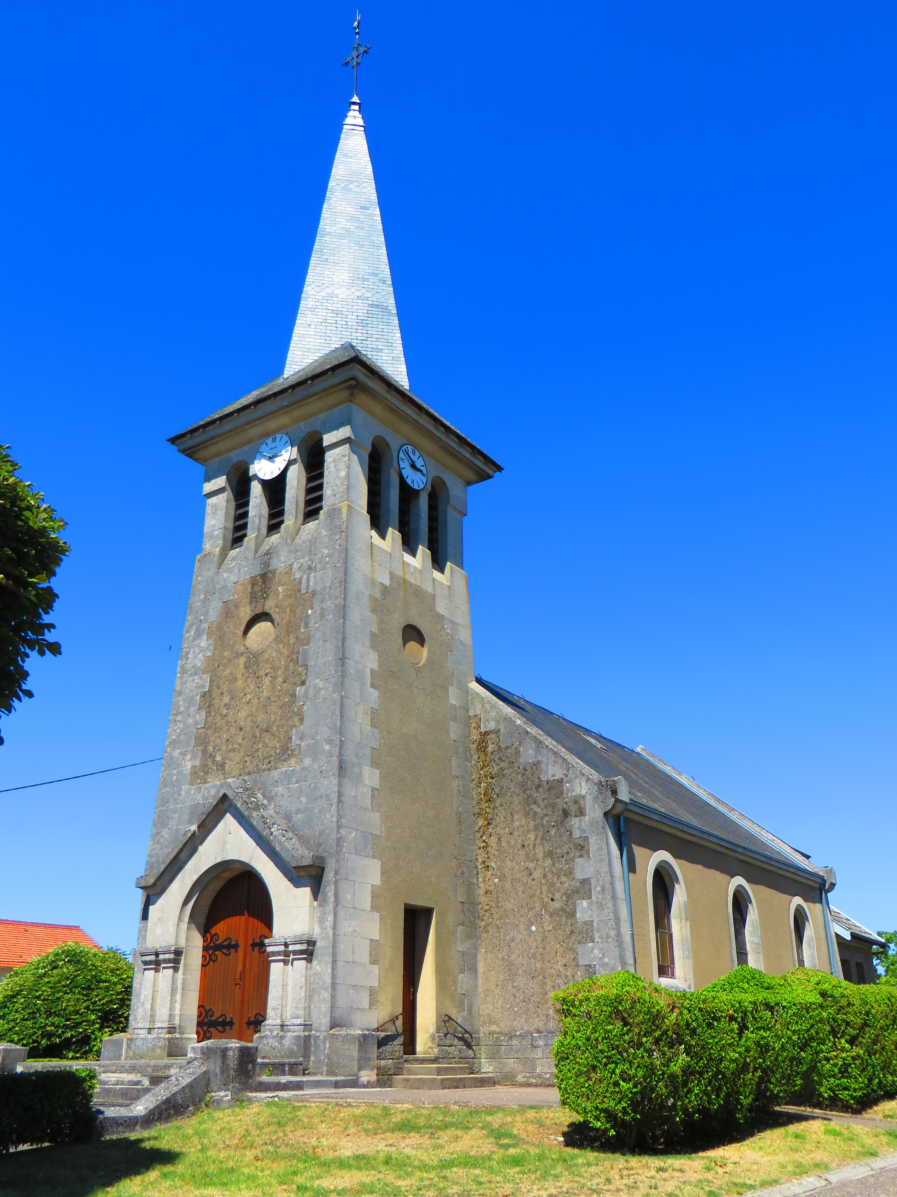 Châtillon-sous-les-Côtes L'église Saint-Martin